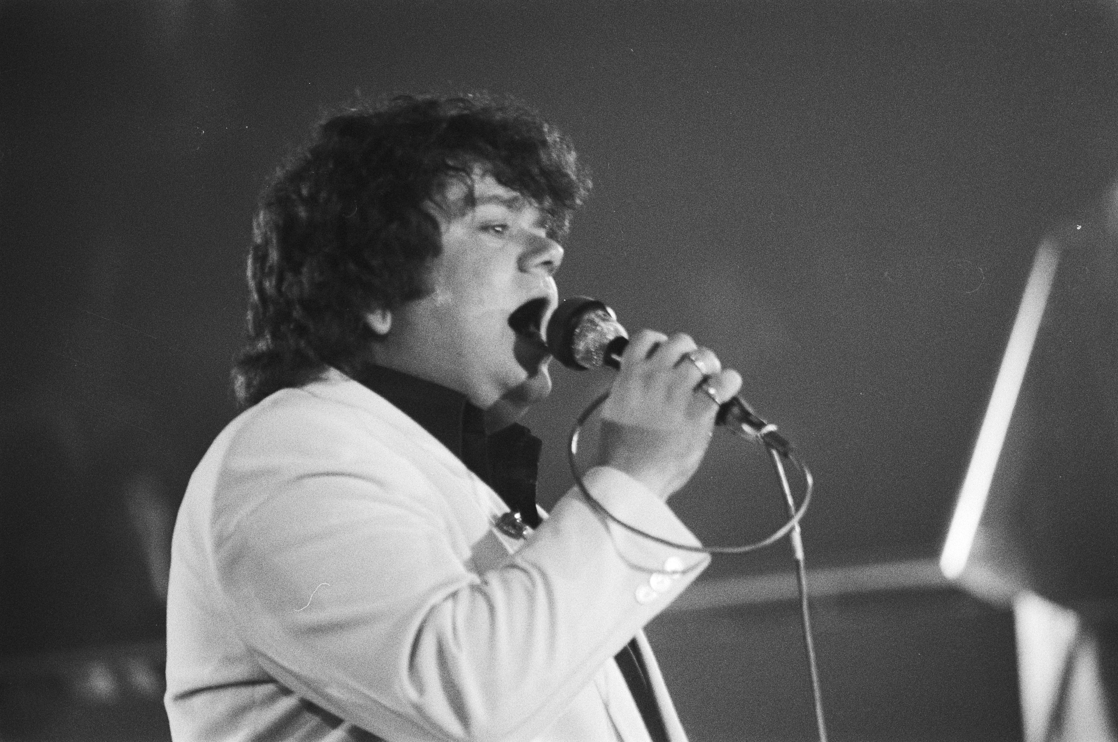 Collectie / Archief : Fotocollectie Anefo Reportage / Serie : [ onbekend ] Beschrijving : Opnamen in Flint in Amersfoort van programma over zanger Andre Hazes dat de TROS 26 maart aanstaande uitzendt. Andre Hazes zingend Datum : 5 februari 1982 Locatie : Amersfoort Trefwoorden : OPNAMEN, PROGRAMMAS, zangers Persoonsnaam : Hazes, André Instellingsnaam : TROS Fotograaf : Dijk, Hans van / Anefo Auteursrechthebbende : Nationaal Archief Materiaalsoort : Negatief (zwart/wit) Nummer archiefinventaris : bekijk toegang 2.24.01.05 Bestanddeelnummer : 931-9554